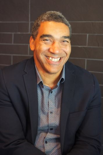 Dean Bergeron, photo prise le 6 octobre 2017